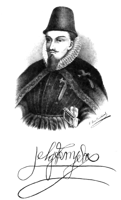 Diego López de Zúñiga y Velasco, Conde de Nieva (c. 1510 - 1564), 4to. virrey del Perú (1561-1564).